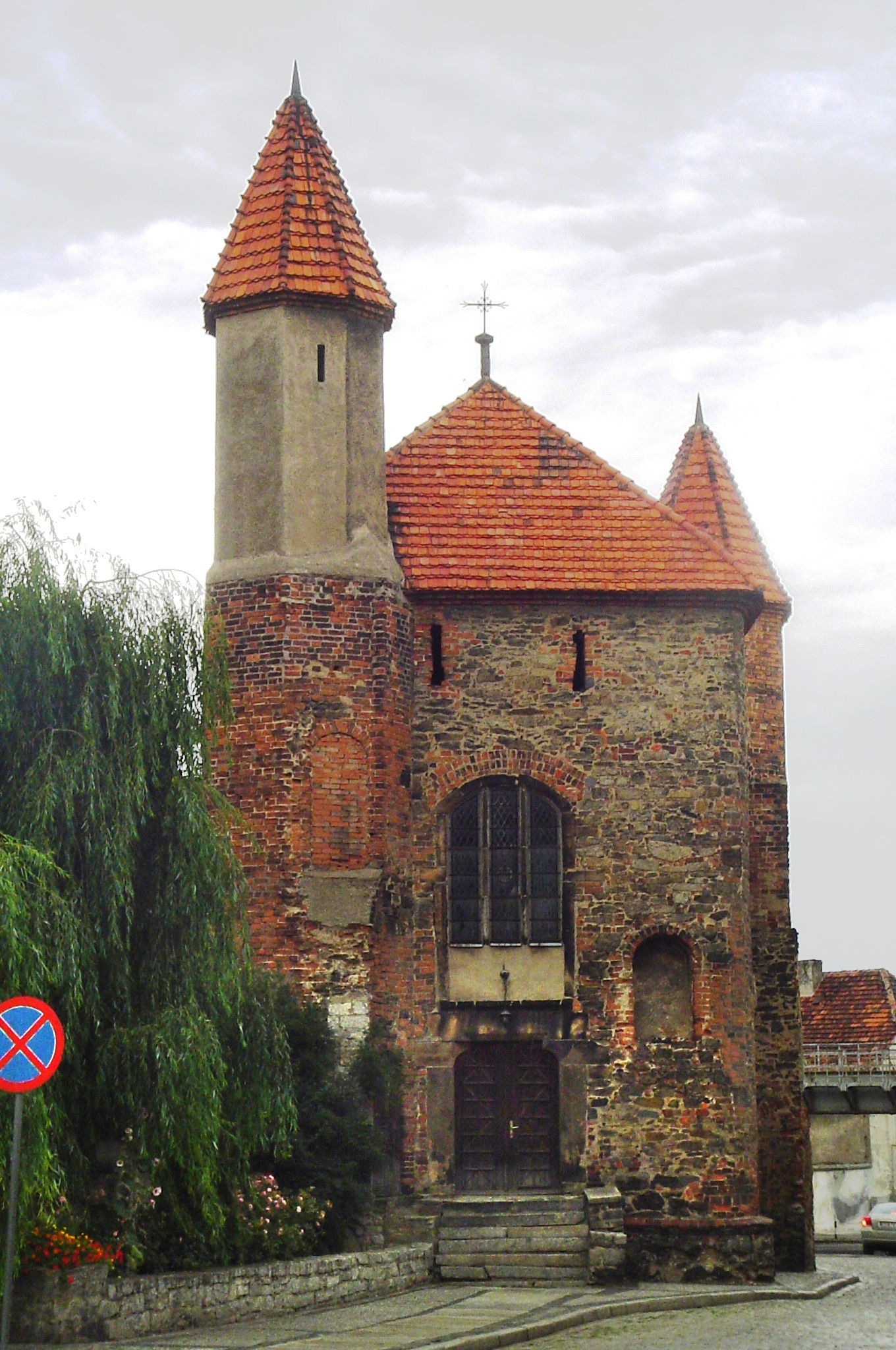 Strzegom, ul. Dąbrowskiego - dawna kaplica obronna, obecnie kościół pomocniczy p.w. św. Antoniego (zabytek nr A/1679/199 .05.1950)